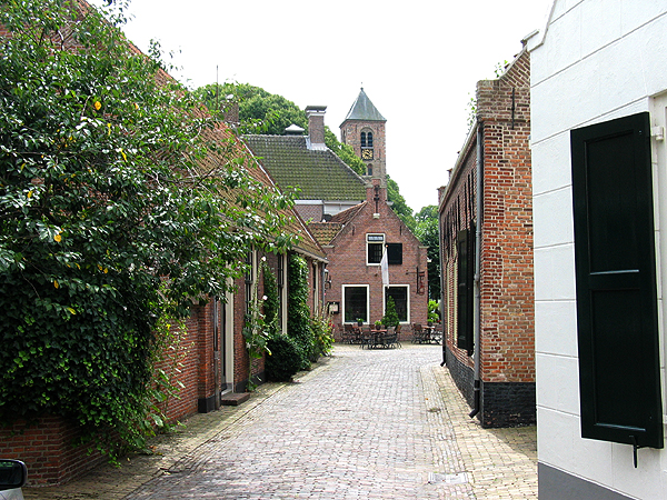 Velsen Zuid, zaterdag nl:2 augustus nl:2003. Eigen foto Gerard Hogervorst.